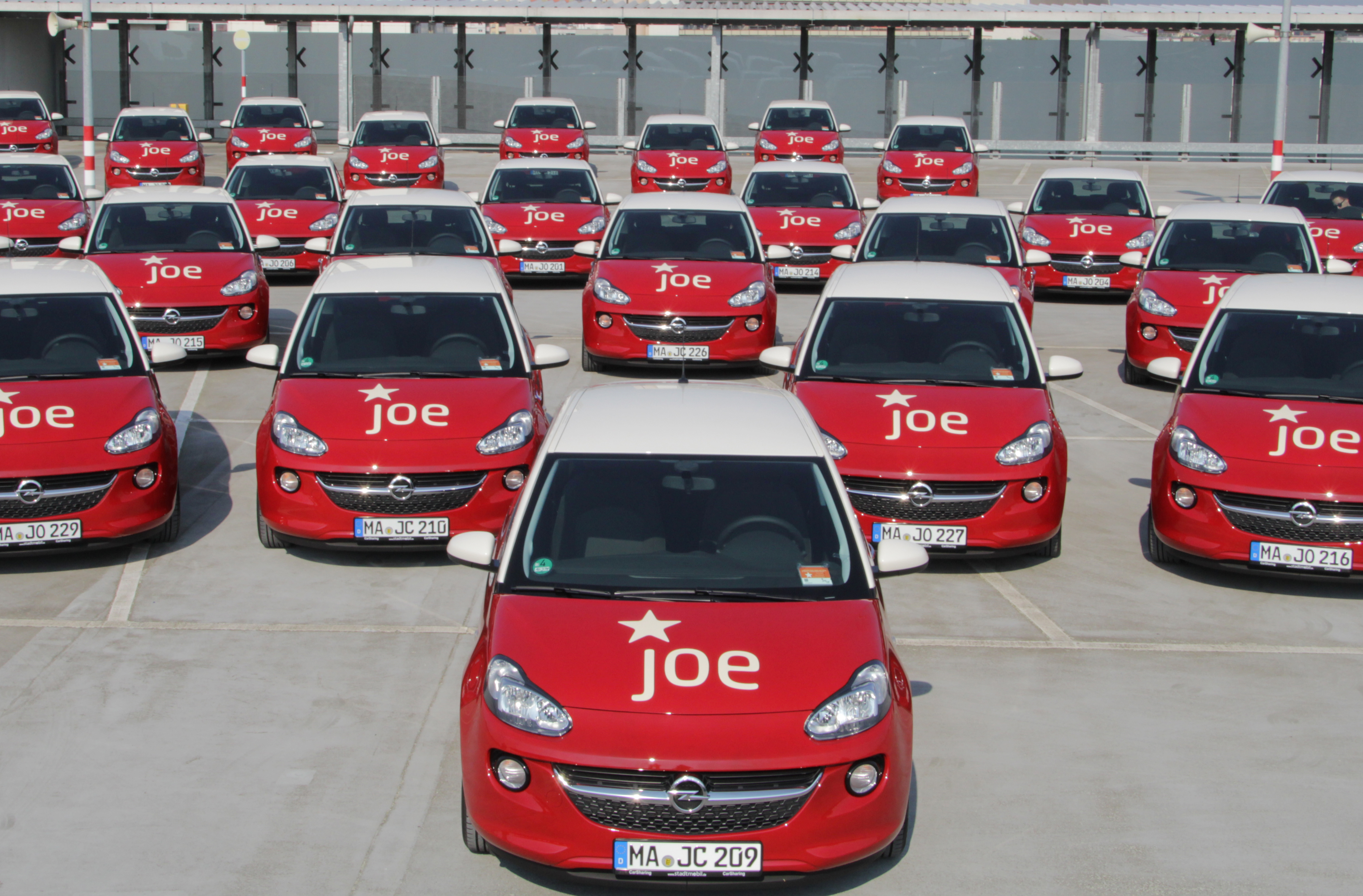 JoeCar-Flotte von stadtmobil (2015)